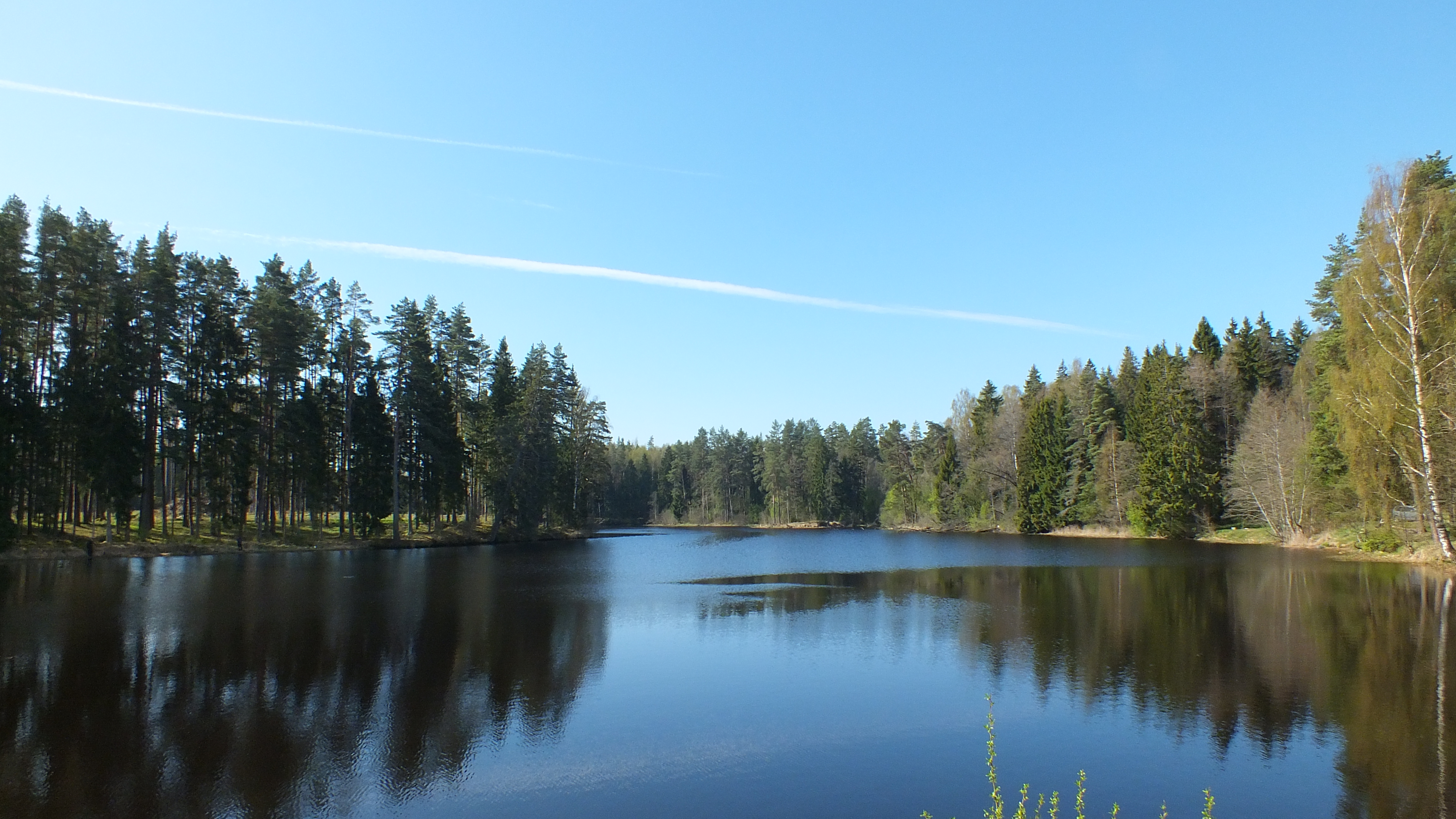 Ņega augšpus P85